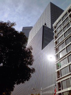 キャピトル東急タワー